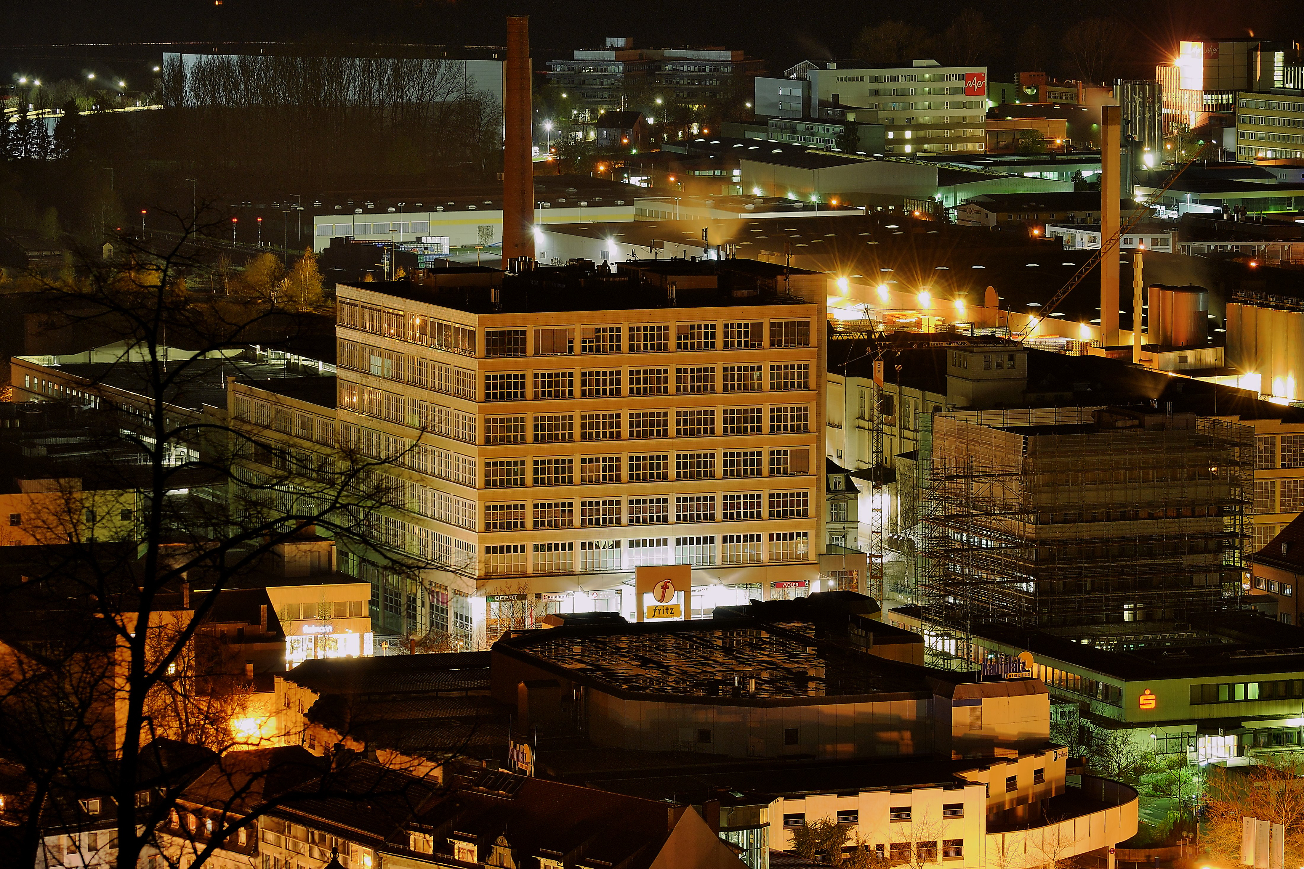 Einkaufszentrum "fritz" (ehemals Kulmbacher Spinnerei)